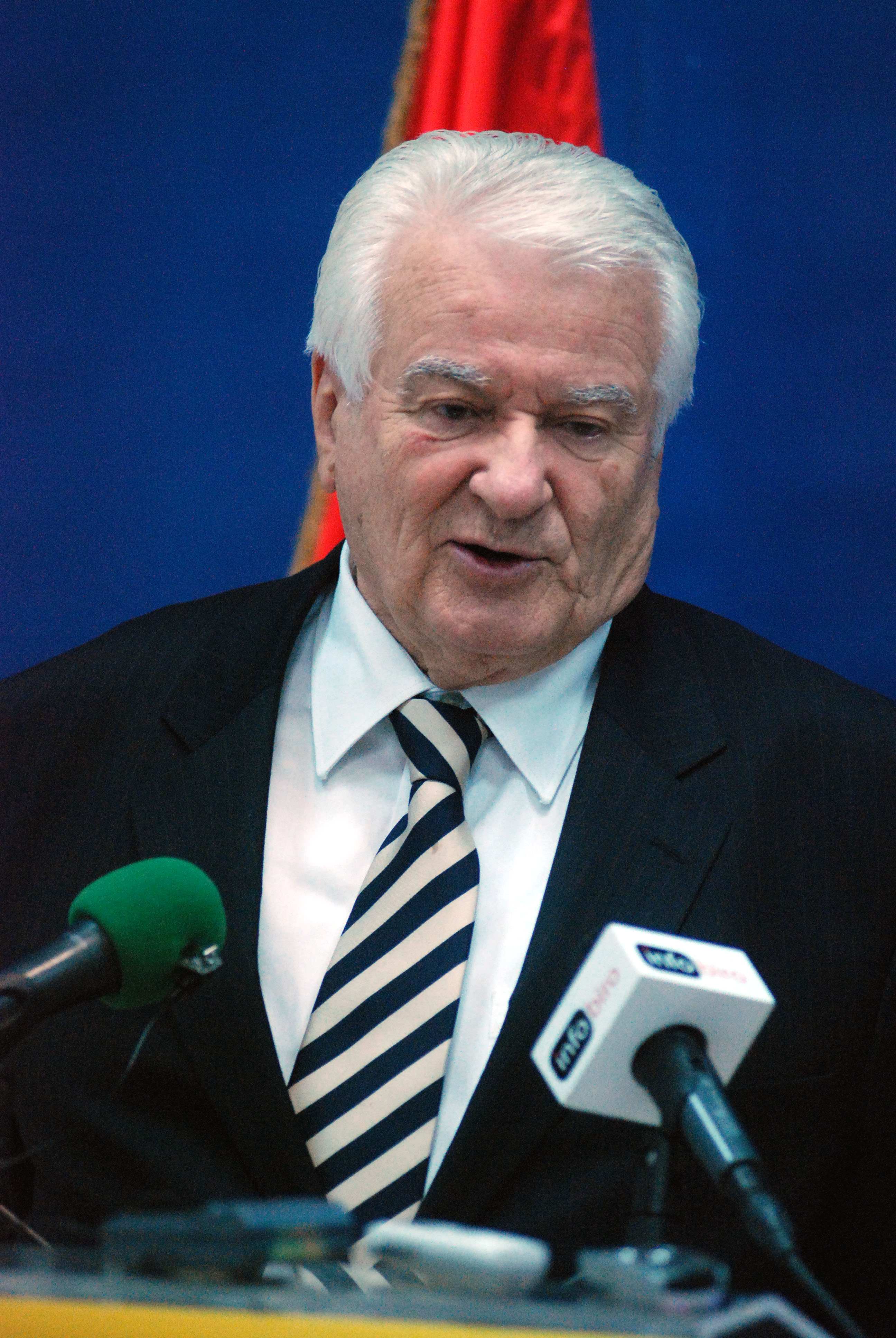 Predsednik Političkog saveta DS i prvi predsednik Demokratske stranke Dragoljub Mićunović na konferenciji za medije povodom 20 godina od osnivanja Demokratske stranke i njenog upisa u registar političkih stranaka (12. decembar 2009); autor: Nenad Stojanović, Foto servis DS (posetite )